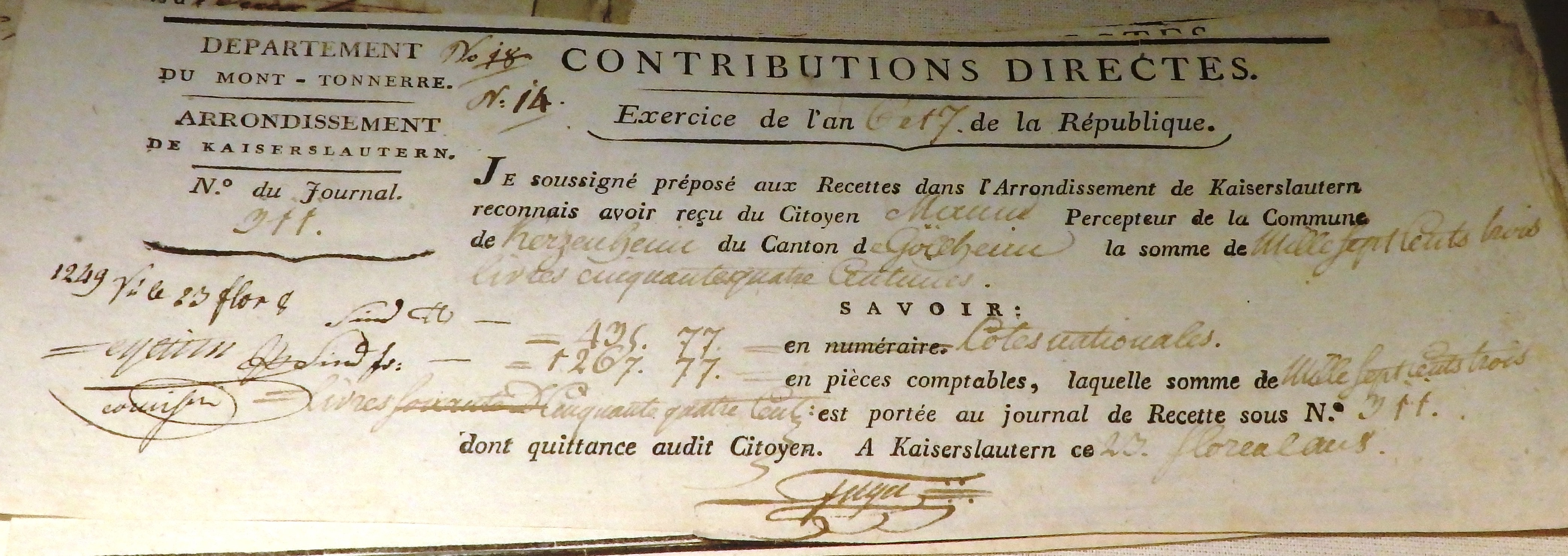 Kontributionsschein der Französischen Republik, l'an 6 et 7 (1798 und 1799), Arrondissement Kaiserslautern, für die Orte Kerzenheim und Göllheim, Stadtmuseum Speyer